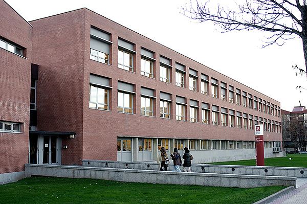 Edificio Quintiliano de la Universidad de La Rioja.